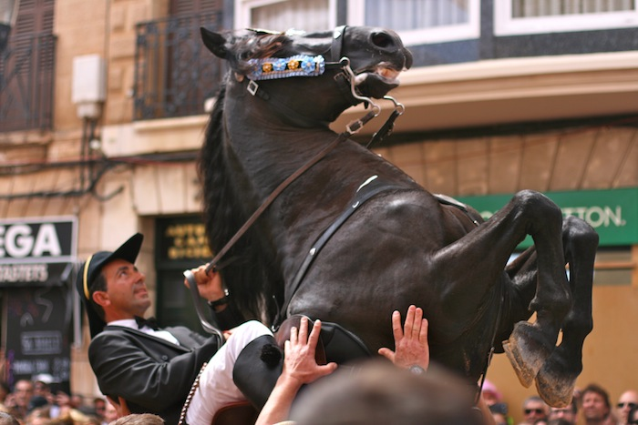 Fiestas de Gràcia (Maó) This is a photography of a Folklore festival in Spain (Wikidata id Q13258770).